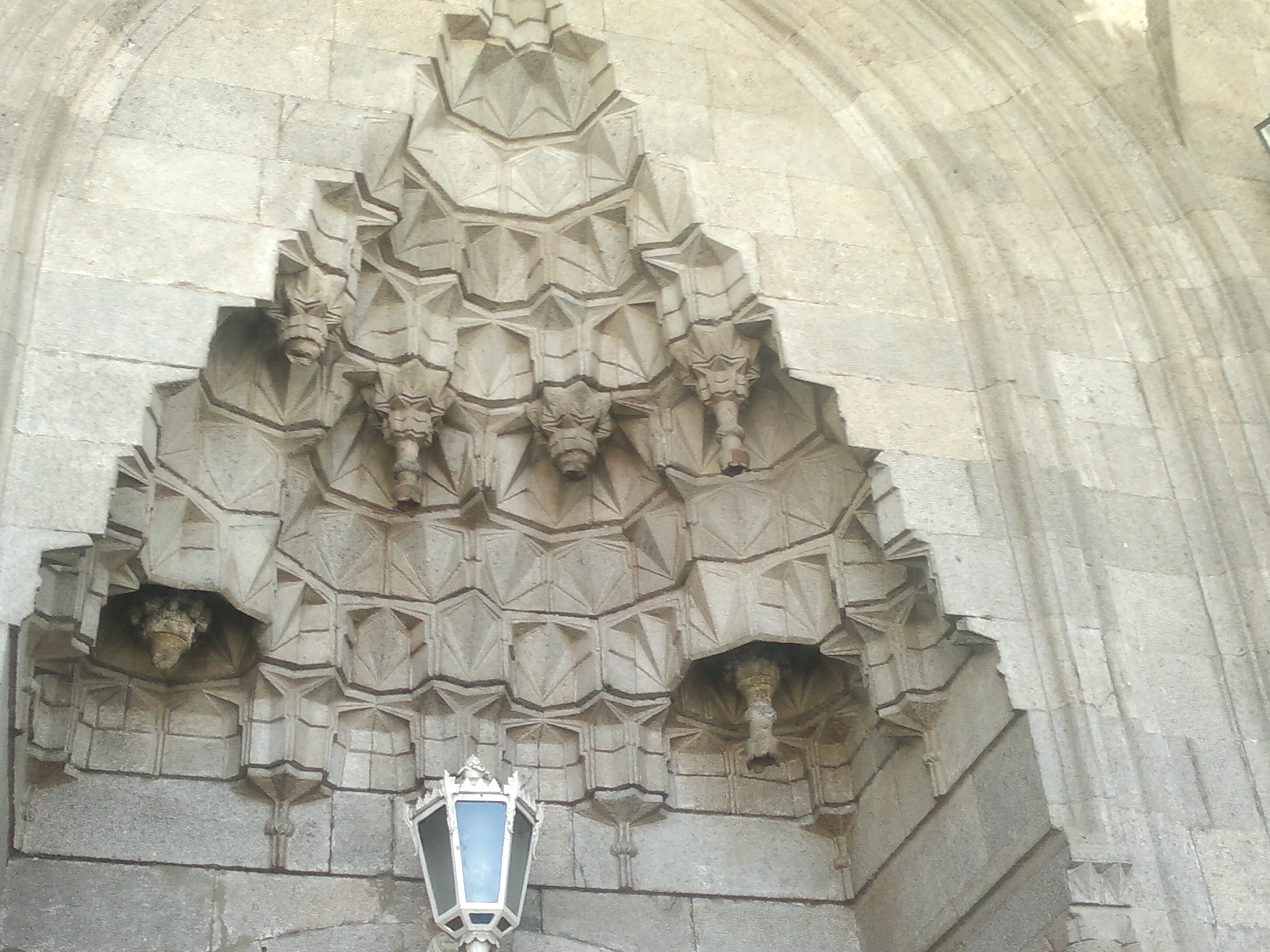 Erzurum Lala Mustafa Paşa Camii, Türkiye'de Erzurum İli merkez ilçesi Yakutiye'de 1562 yılında Lala Mustafa Paşa tarafından yaptırılmış Erzurum ’daki ilk Osmanlı camisidir.